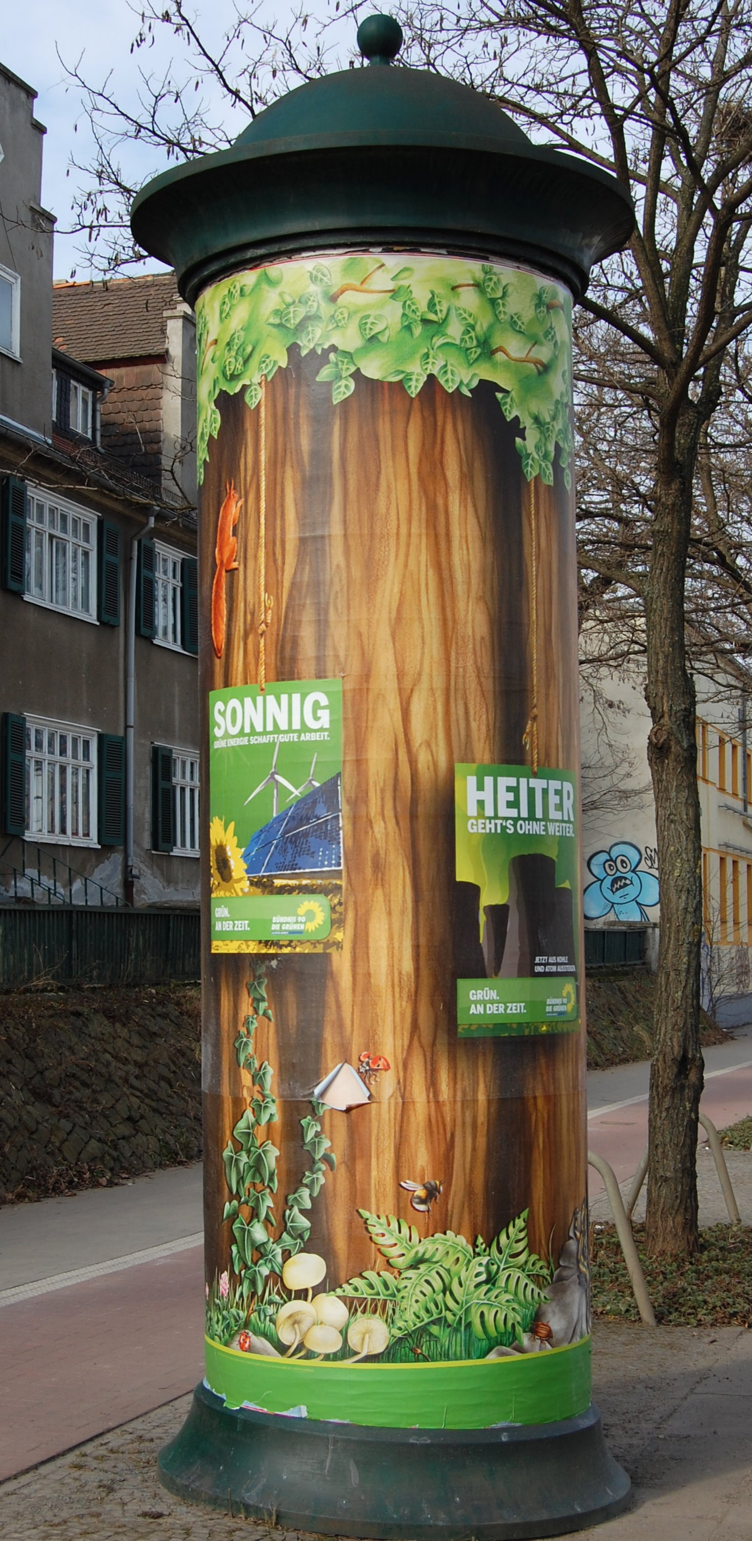 Litfaßsäule mit Wahlwerbung von Bündnis 90/Die Grünen zur Landtagswahl in Sachsen-Anhalt 2011 in Magdeburg-Buckau